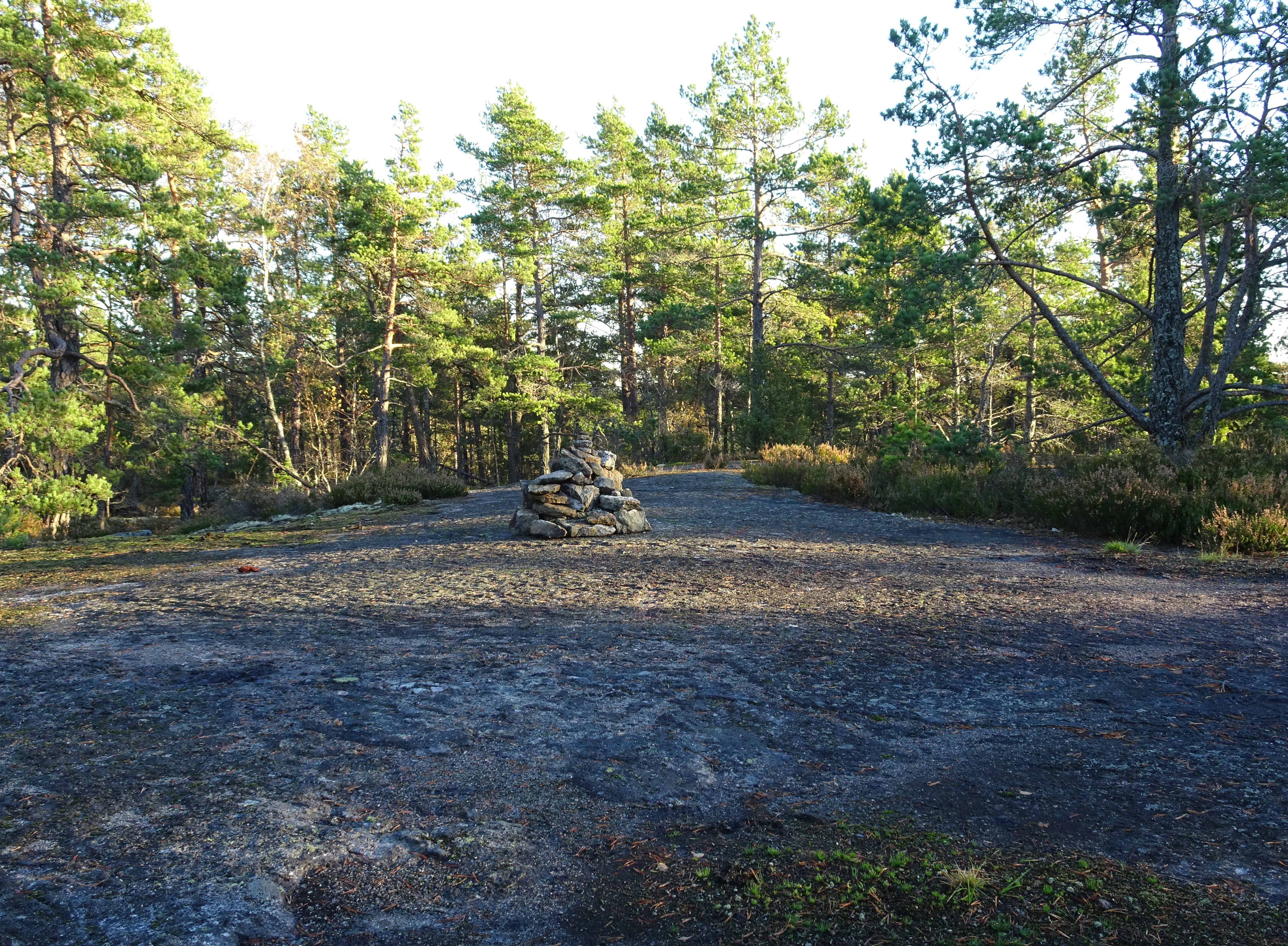 Tornbergets topp 111 m ö h, Stockholms läns högsta naturliga punkt